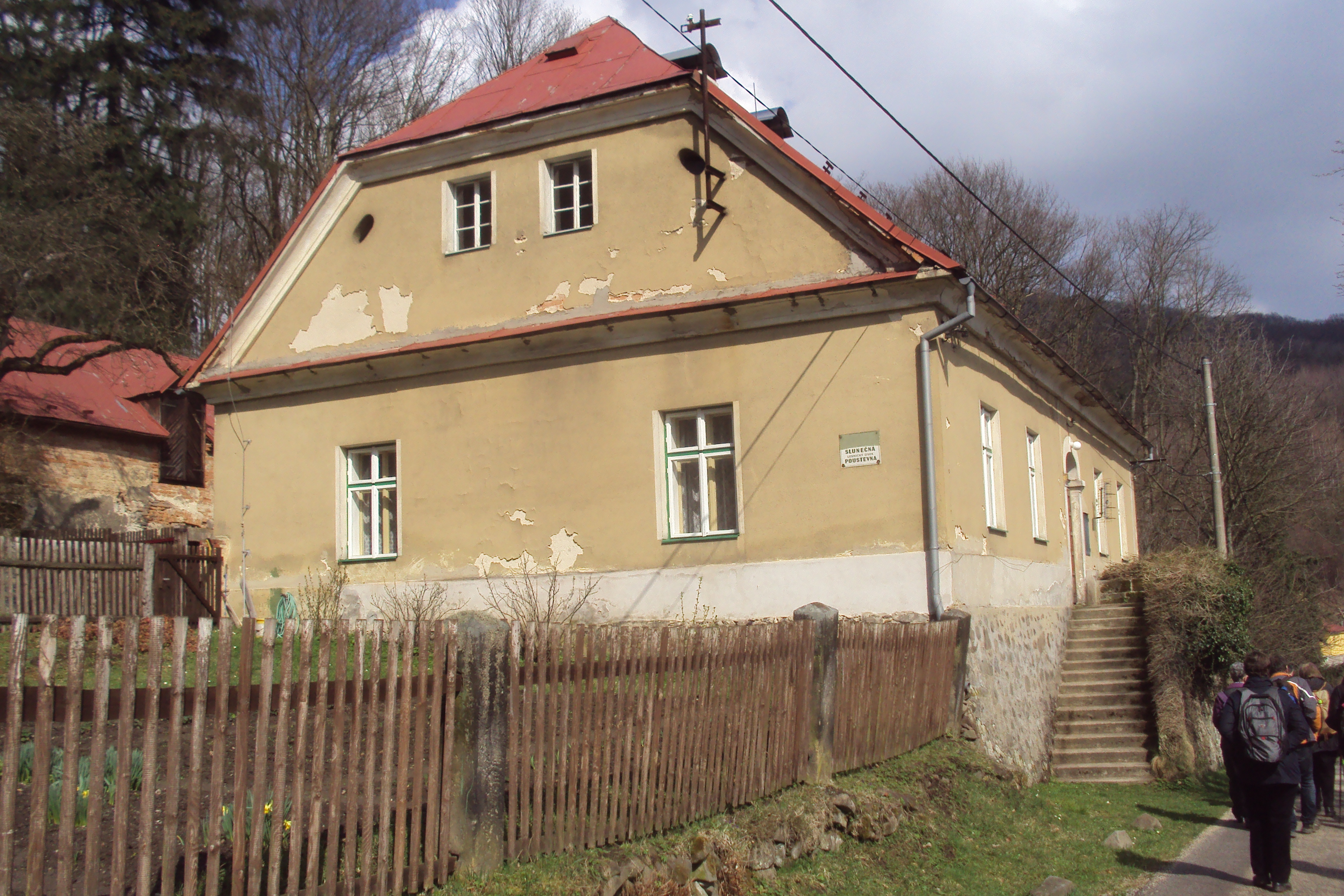 Stavení Poustevna, Skalice č.88 na Českolipsku